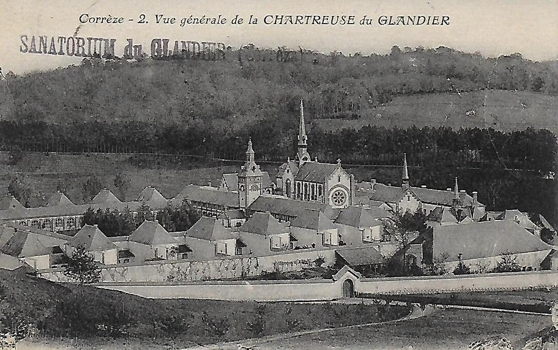 Le Glandier en 1922